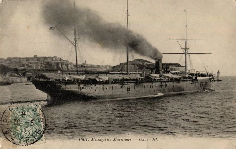 L'Oxus, des Messageries Maritimes, quittant Marseille pour l'Orient. Carte postale déposée à la poste française de Port Saïd en 1911, l'année où Henry de Monfreid quittait la France pour la Corne de l'Afrique sur ce même navire. Je revois encore la silhouette de l'Oxus, un des anciens paquebots des Messageries Maritimes, les plus rapides de leur époque, taillés en croiseur, à l'étrave effilée. [...] La haute mâture peinte en blanc, la grand'vergue de misaine où, pendant la mousson, on mettait encore de la toile. (Henry de Monfreid, Le lépreux, Grasset, 1935, p. 14.)